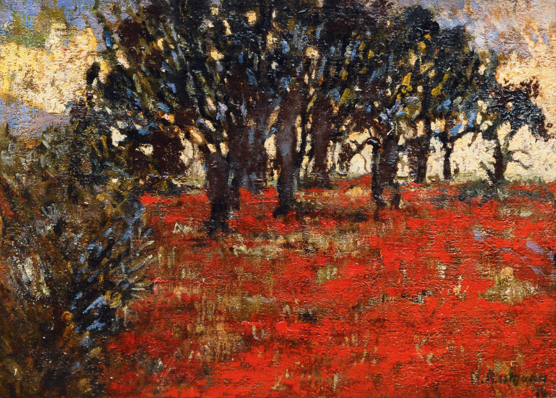 Mohnfeld. Öl auf Leinwand. 31,5 × 44 cm